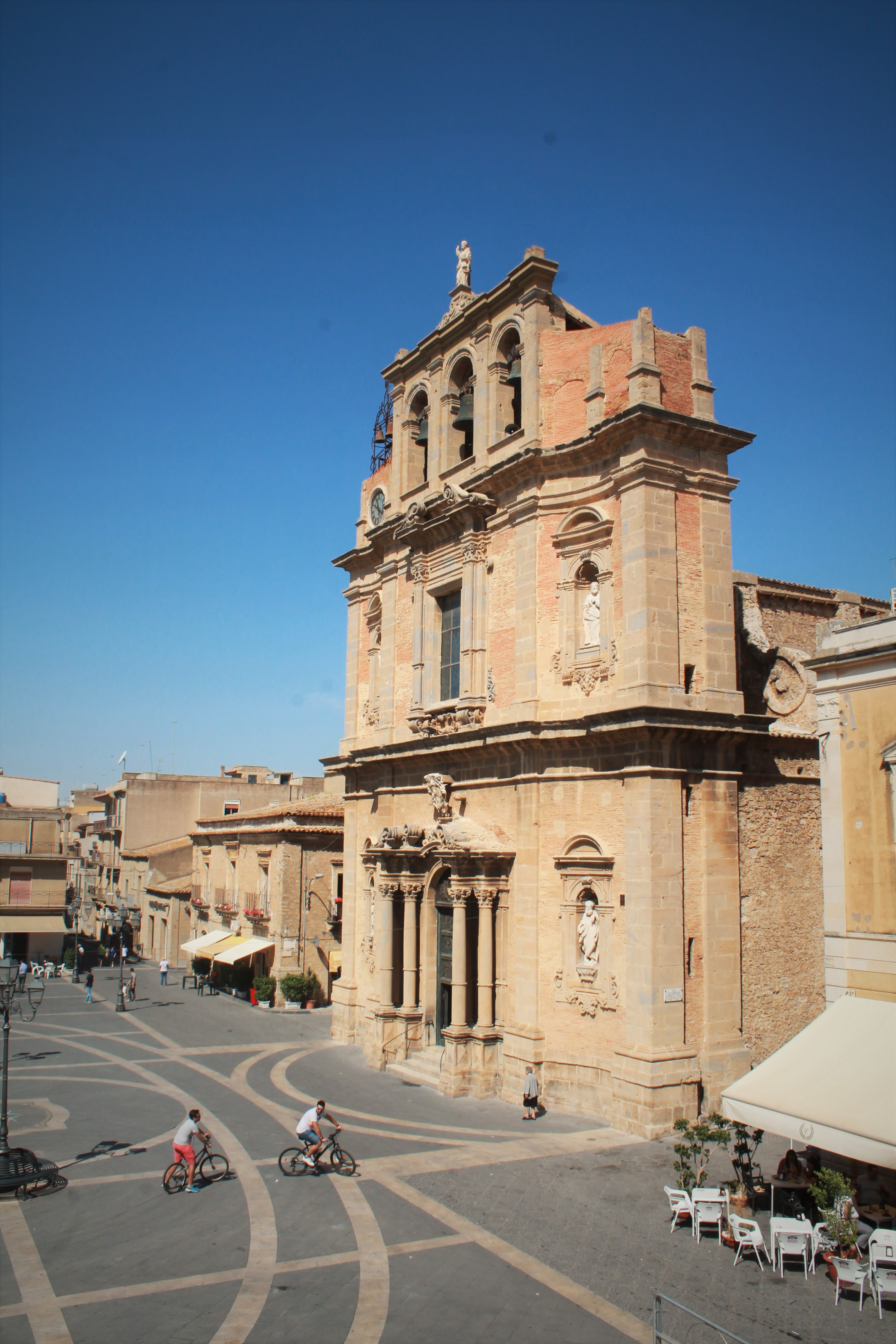 Facciata della Chiesa Madre di Niscemi (CL)